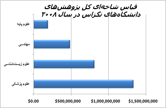 قیاس شاخه‌ای کل پژوهش‌های دانشگاه‌های تگزاس در سال ۲۰۰۸